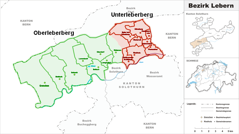 Übersichtskarte der Gemeinden des Bezirks Lebern, der Amtei Solothurn-Lebern, im Kanton Solothurn, in der Schweiz, dargestellt sind die zwei Hauptregionen der Ober- und der Unterleberberg in Grün bzw. Rot